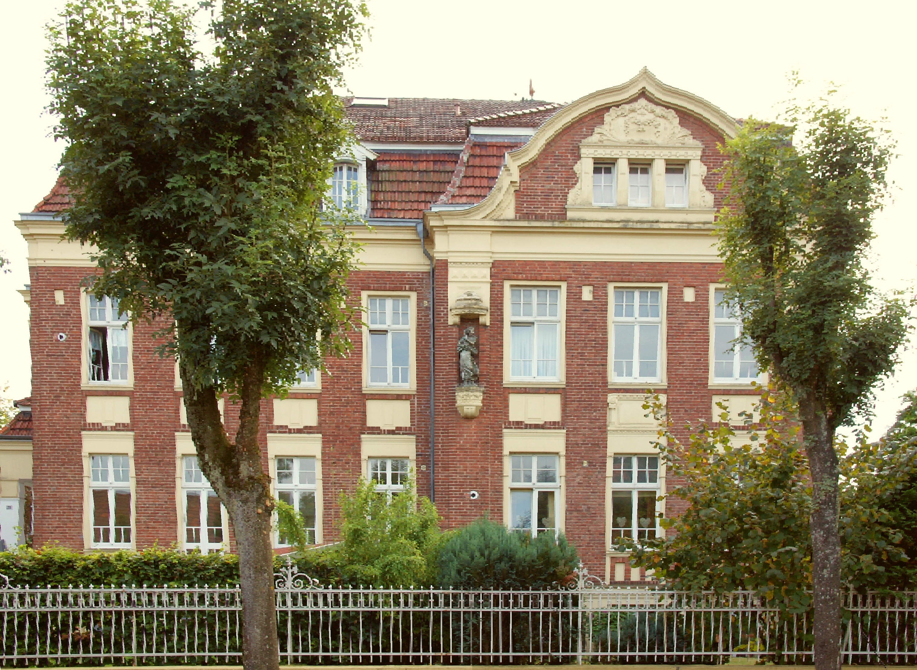 ehemaliges St.-Josef-Stift in 48599 Gronau (Westfalen), Ortsteil Epe, Zum Bahnhof 23, unter Denkmalschutz, zu Eigentumswohnungen umgebaut This is a photograph of an architectural monument.